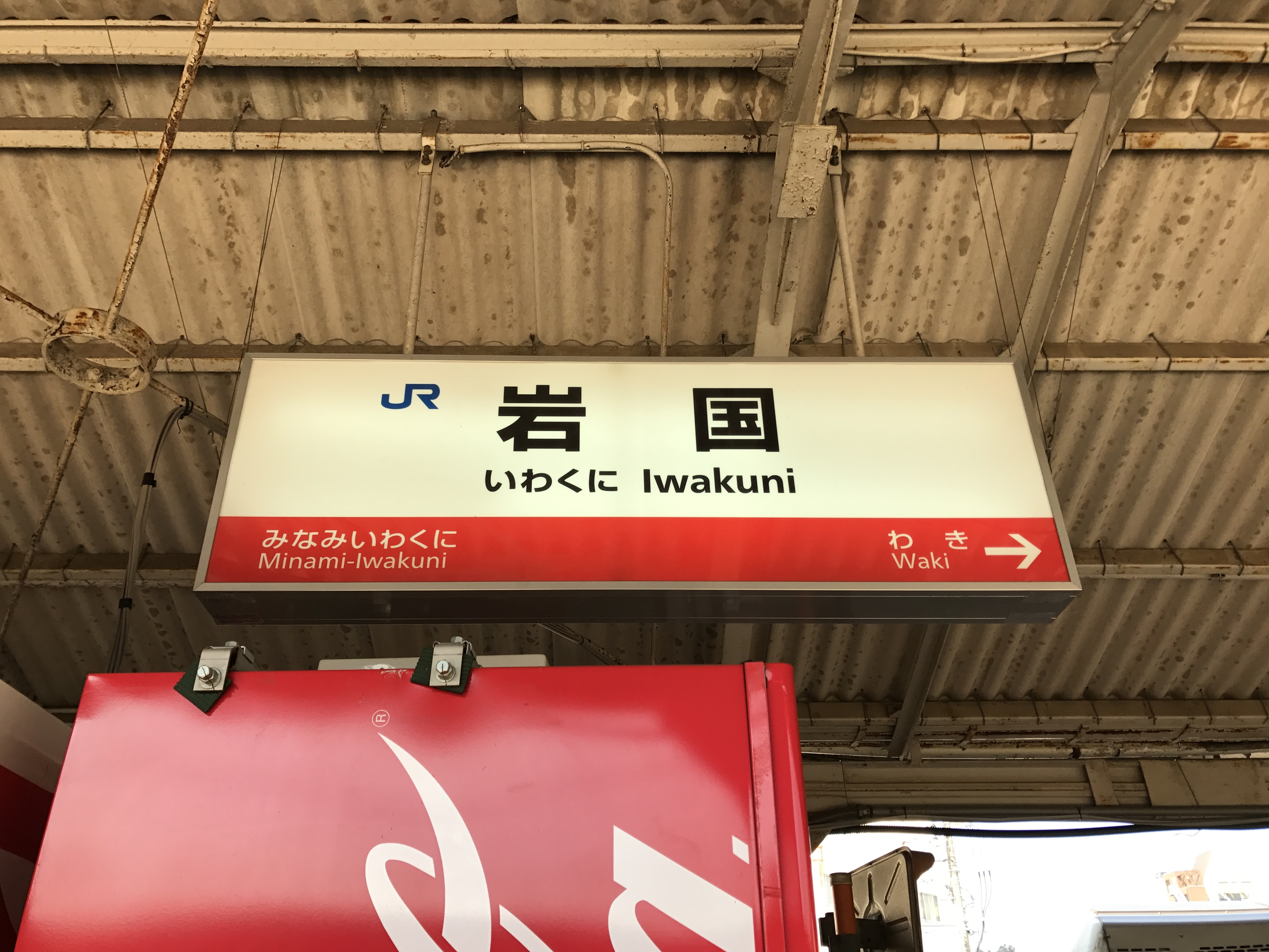 岩国駅(山陽本線)の駅名標